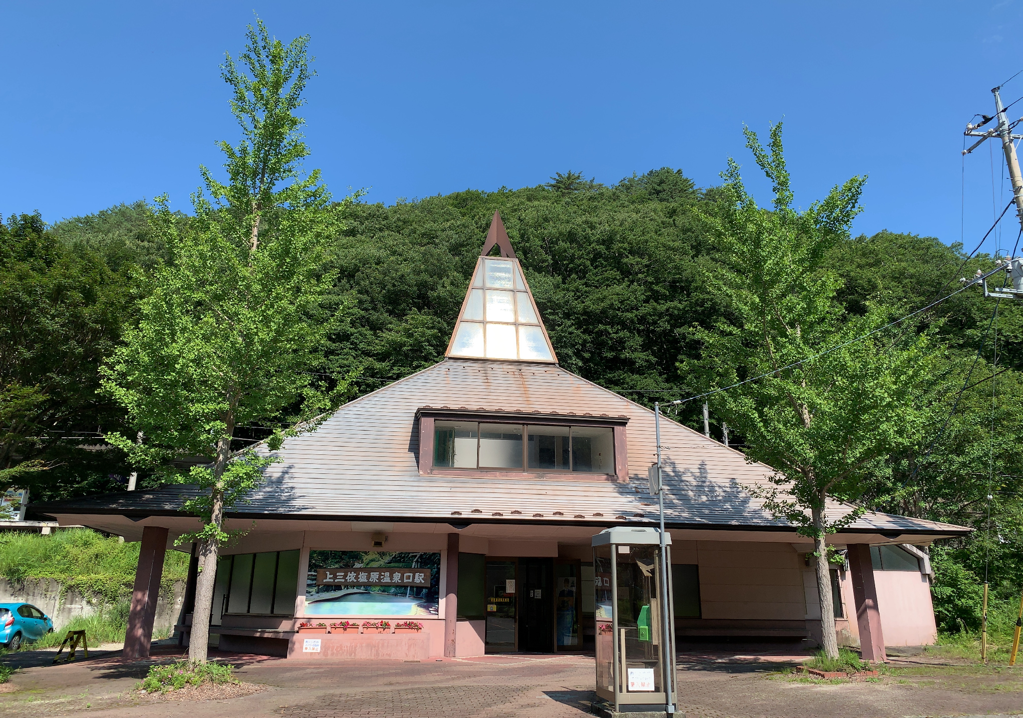 野岩鉄道 上三依塩原温泉口駅 駅舎